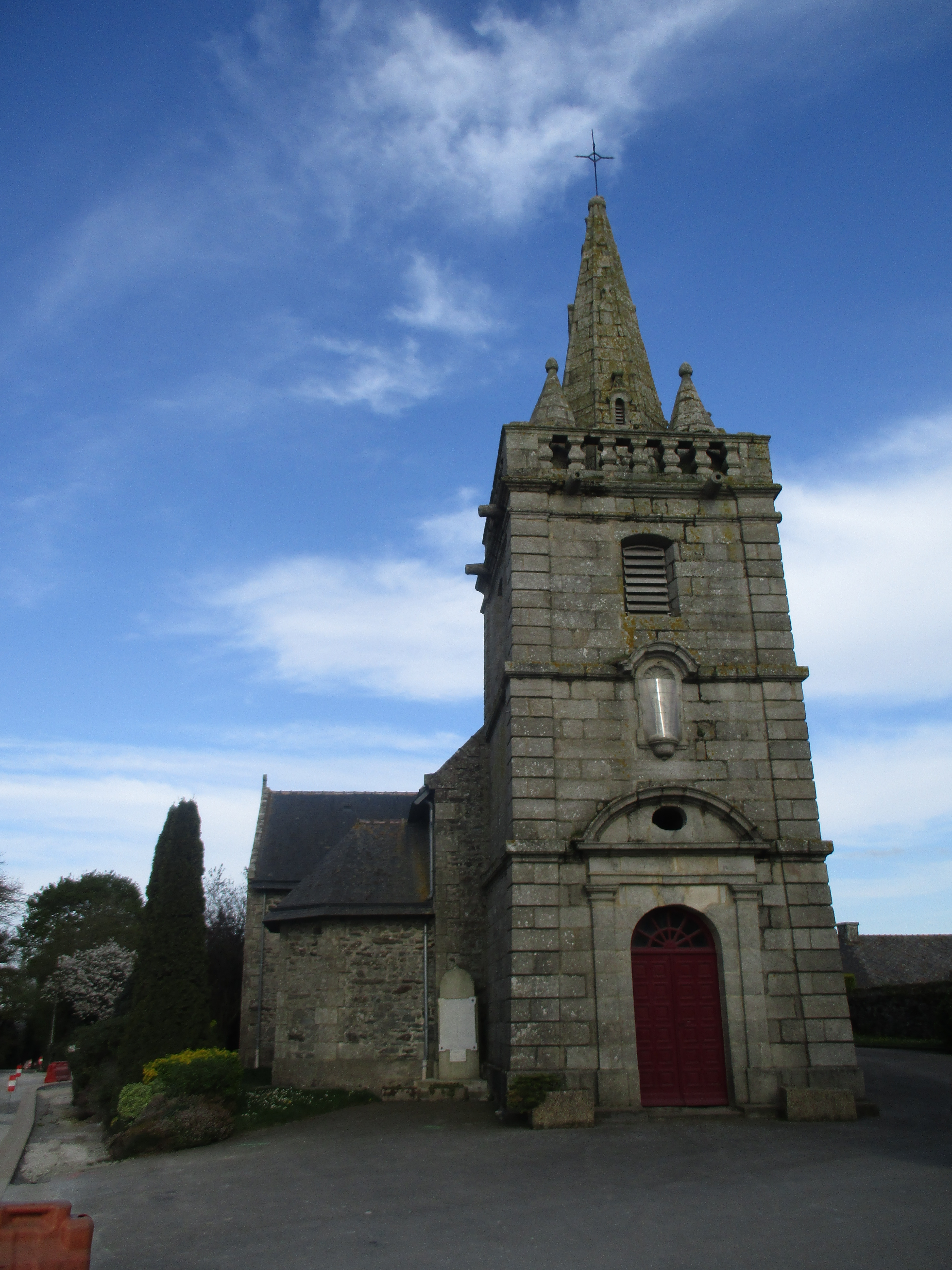 L'église Saint-Samson-et-Saint-Maurice de Croixanvec (56)